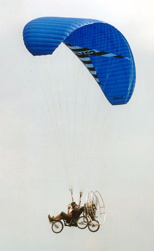 Hängegleiter